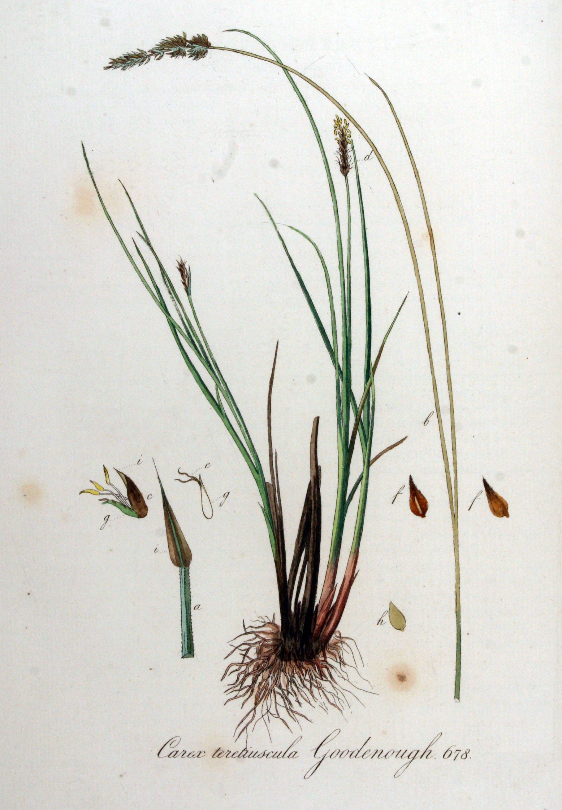 Carex diandra Schrank (Syn. Carex teretiuscula Good.)